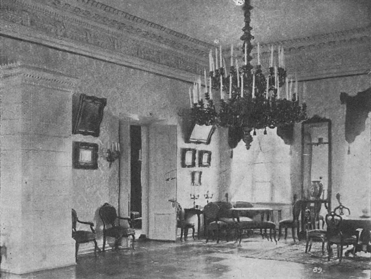 Беларуская (тарашкевіца): Барбароў (Barbaroŭ), сядзіба Горватаў (Horvat)